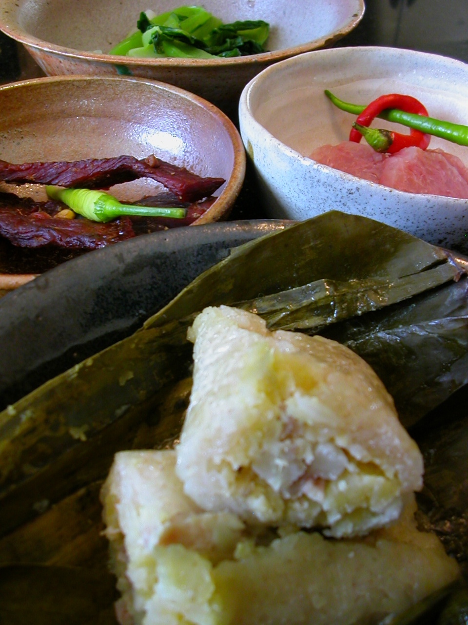 A Lao meal.